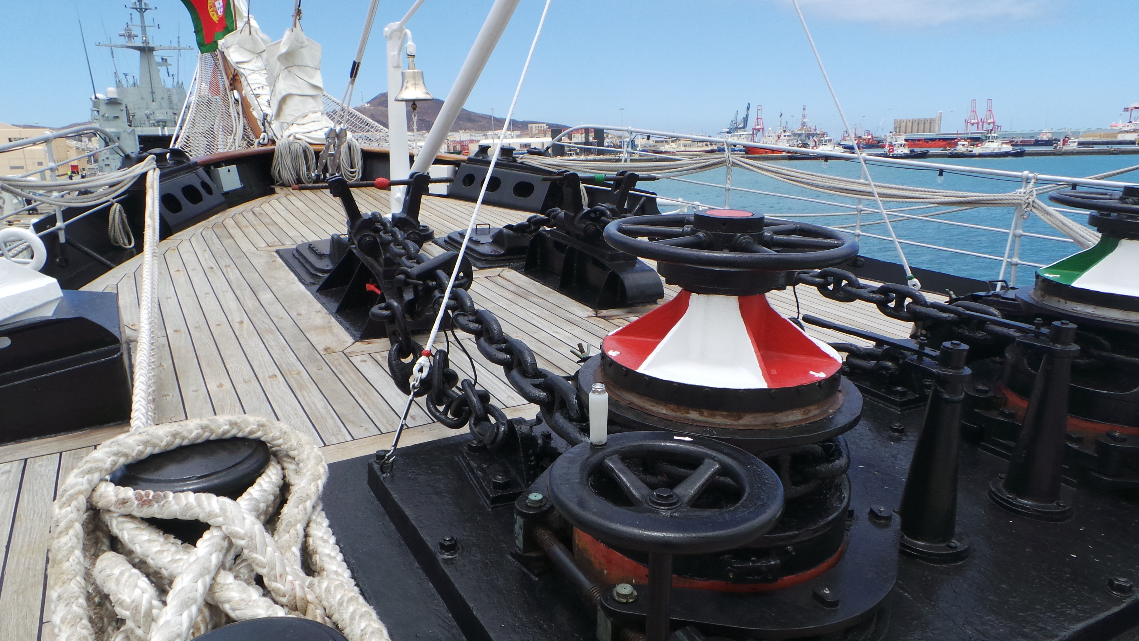 Visita al Buque Escuela NRP Sagres, en La Base Naval de Las Palmas de Gran Canaria. Este fin de semana de semana ( 20, 21 y 22 de junio de 2014) tenemos la oportunidad de disfrutar, en Las Palmas de Gran Canaria, de la visita del buque escuela portugués NRP Sagres, se encuentra atracado en el muelle de la base naval y podrá ser visitado hoy viernes hasta las 19h y mañana sábado de 10 a 12h y de 14 a 19h . El Buque proveniente de Lisboa partirá el domingo hasta Las Azores , para luego regresar a Lisboa, cuenta con unos 60 guardiamarines, con una decena de mujeres entre ellos, que realizan su periodo de instruccion Construido en 1937 en Hamburgo y tras varios avatares, fue adquirido en 1961 por la marina Portuguesa para sustituir al Sagres II, entrando en servicio como Sagres III en febrero de 1962. Tiene 89,5 metros de eslora, 12 de manga y 5,5 de calado, siendo su altura máxima de 45,5 metros. Cuenta además con 1.971 metros cuadrados de vela y desplaza 1.893 toneladas. La figura del mascarón de proa del Sagres III es el Infante D. Henrique nacido el 4 de marzo de 1394, siendo uno de los impulsores de la expansión y descubrimientos portugueses de la época. Más información del Buque : Web del Buque